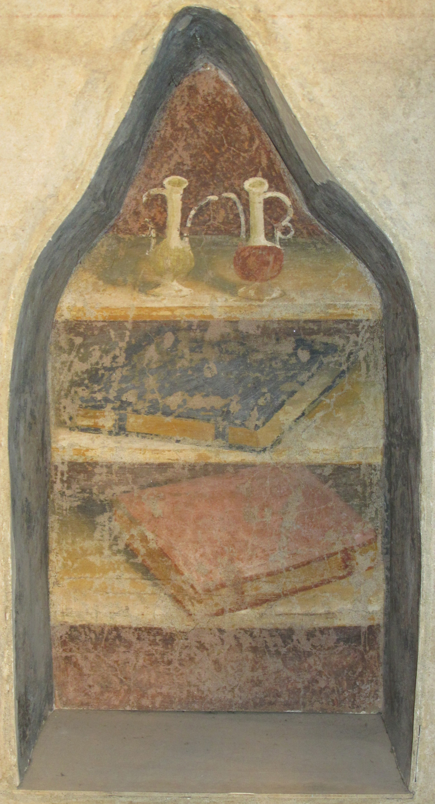 Masolino, cappella di sant'elena, 1424, storie della vera croce, coretto